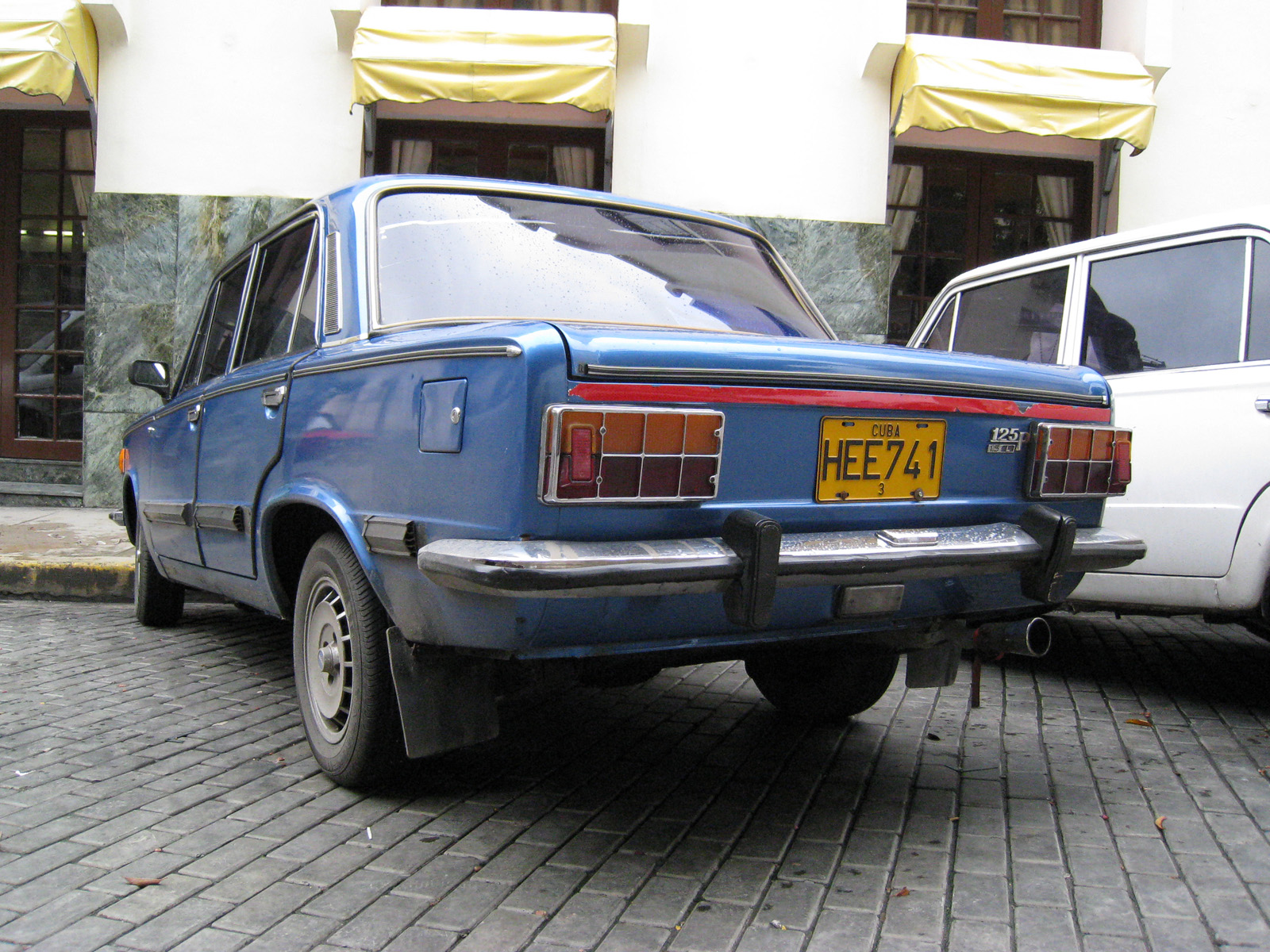 Blue FSO 125p 1.5 L in Havana, Cuba.